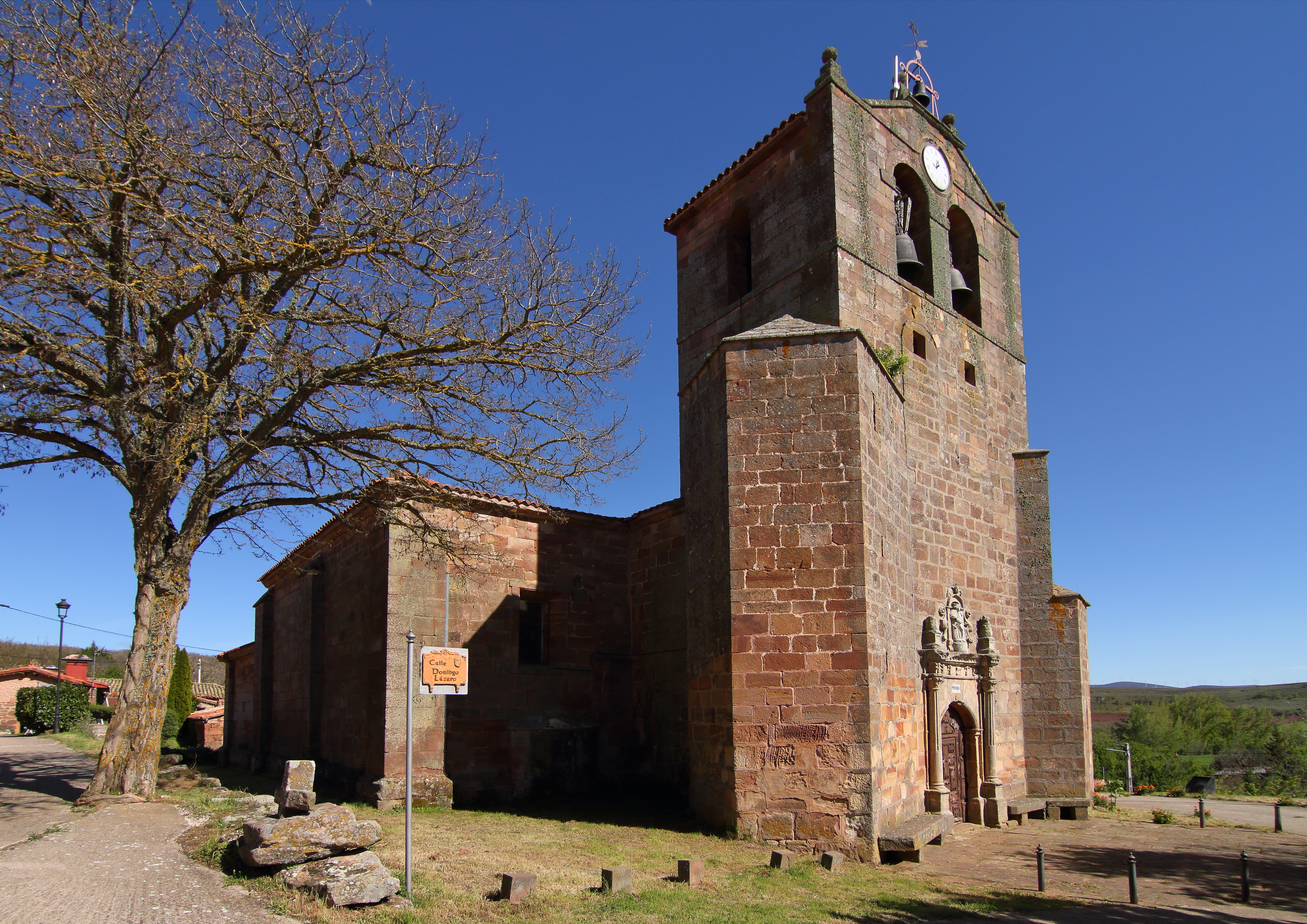 San Adrián de Juarros, Iglesia de la Asunción, 03